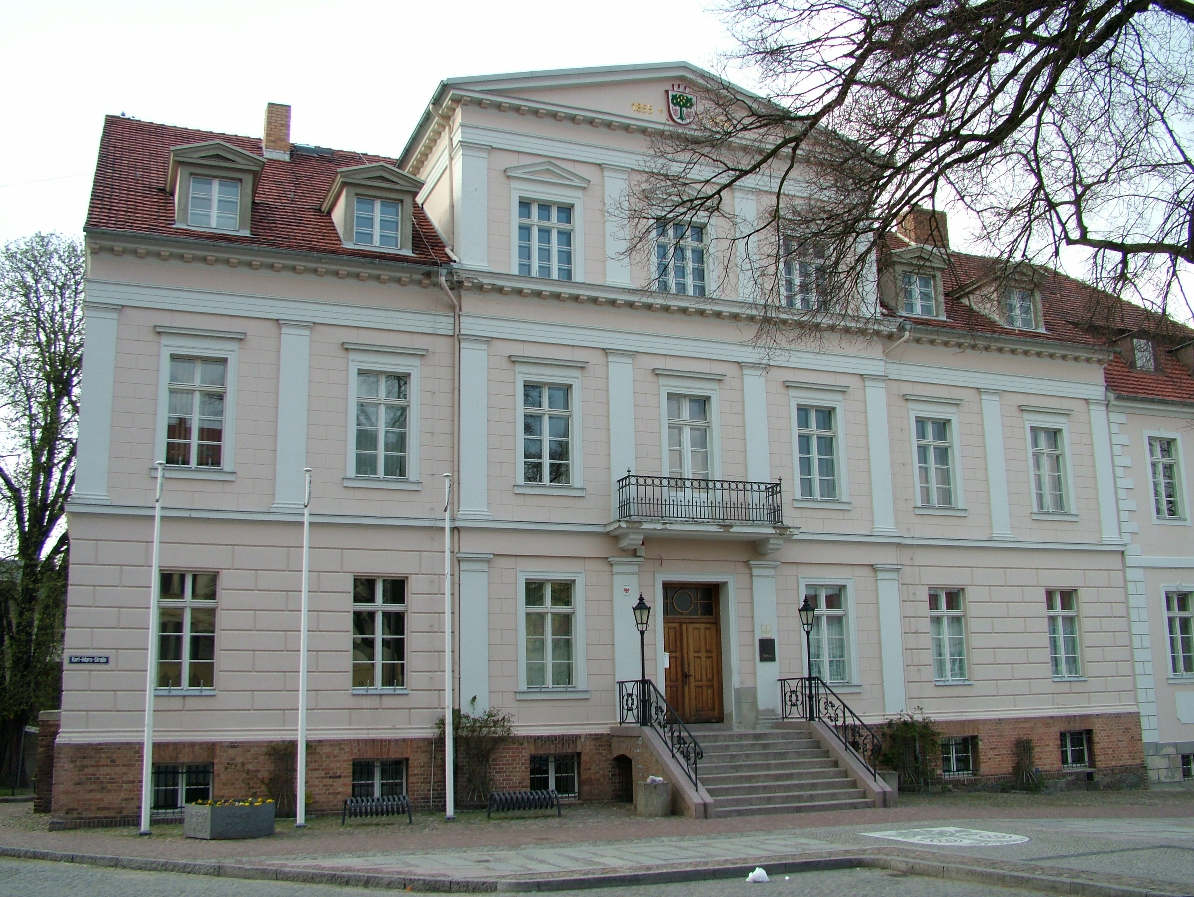 Bad Freienwalde, Brandenburg, Das Rathaus